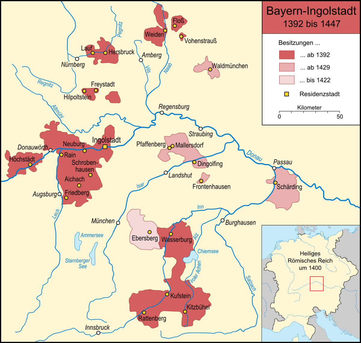 Karte des Teilherzogtums Bayern-Ingolstadt in seiner Ausdehnung von 1392 bis 1447